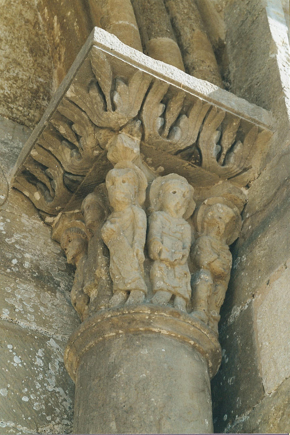 St.-André-de-Bâgé, Portalkapitell rechts